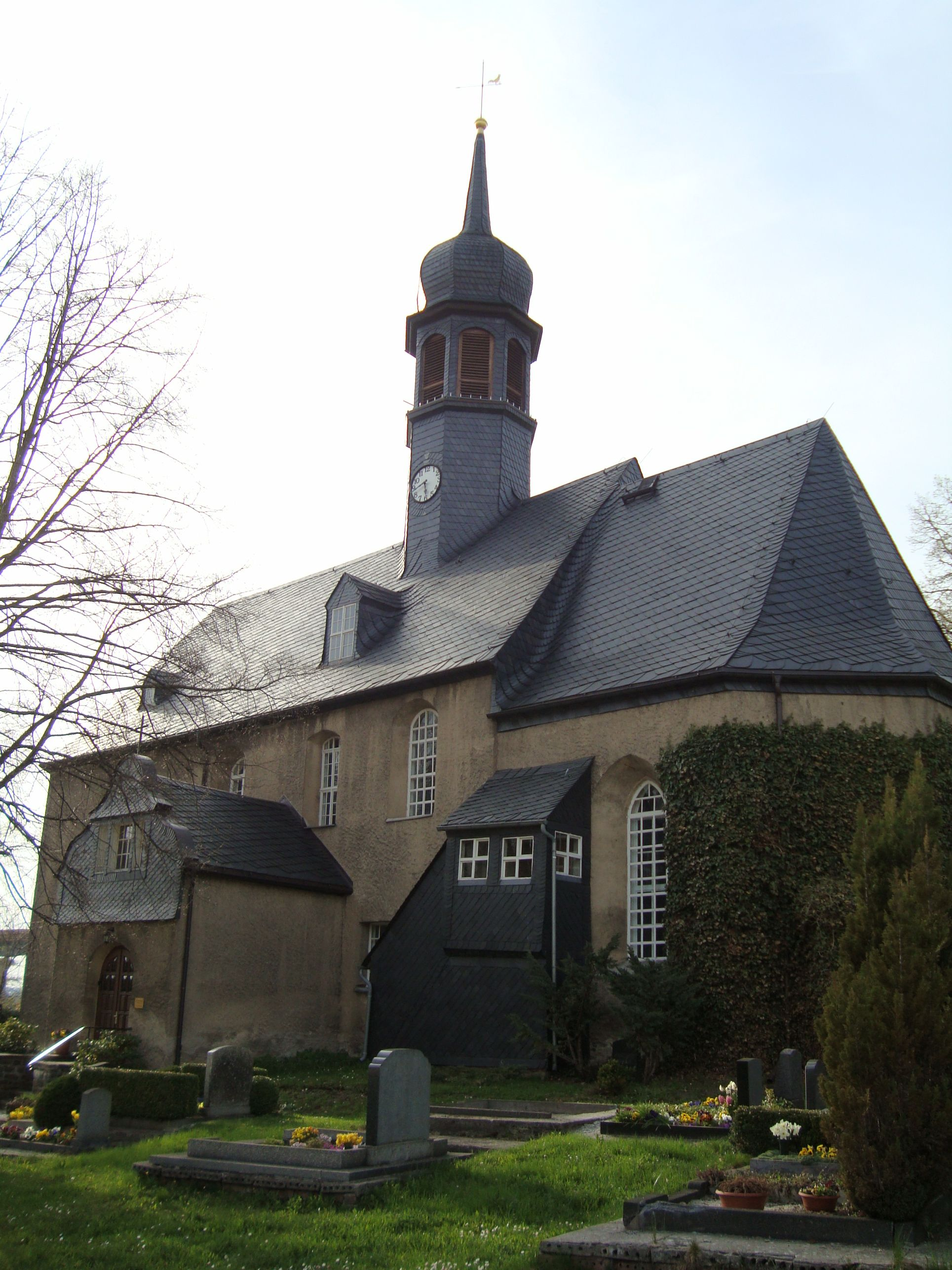 St. Barbarakirche in Markersbach im Erzgebirge, Südostansicht